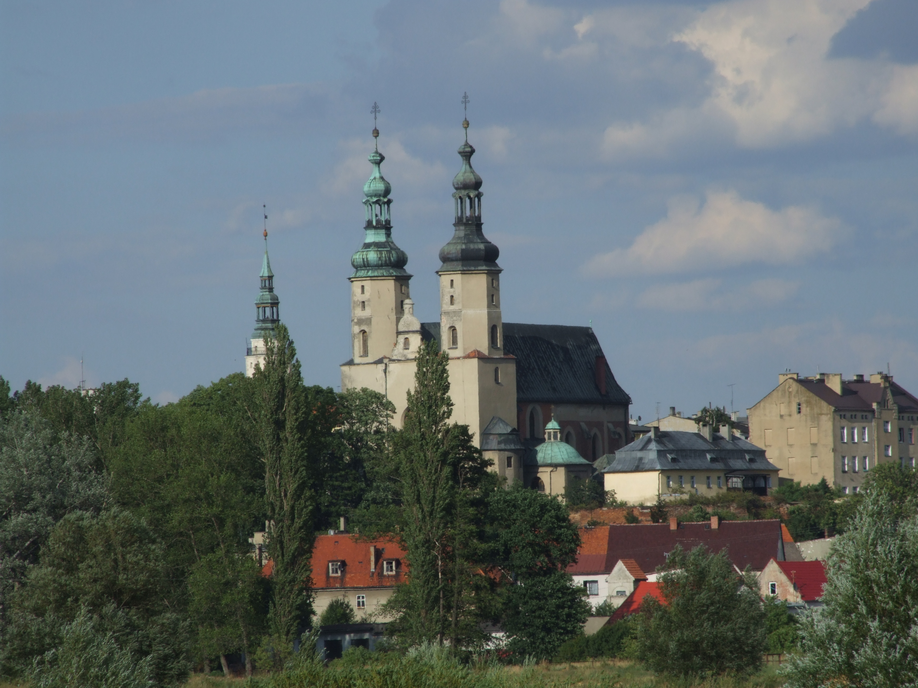 kościół par. p.w. św. Bartłomieja, 1380-XVIII Głogówek, Głogówek 02.1951.